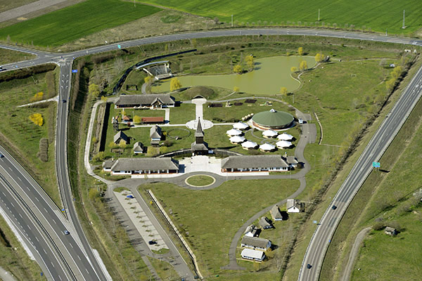 Légi fotó a Polgár melletti archeoparkról